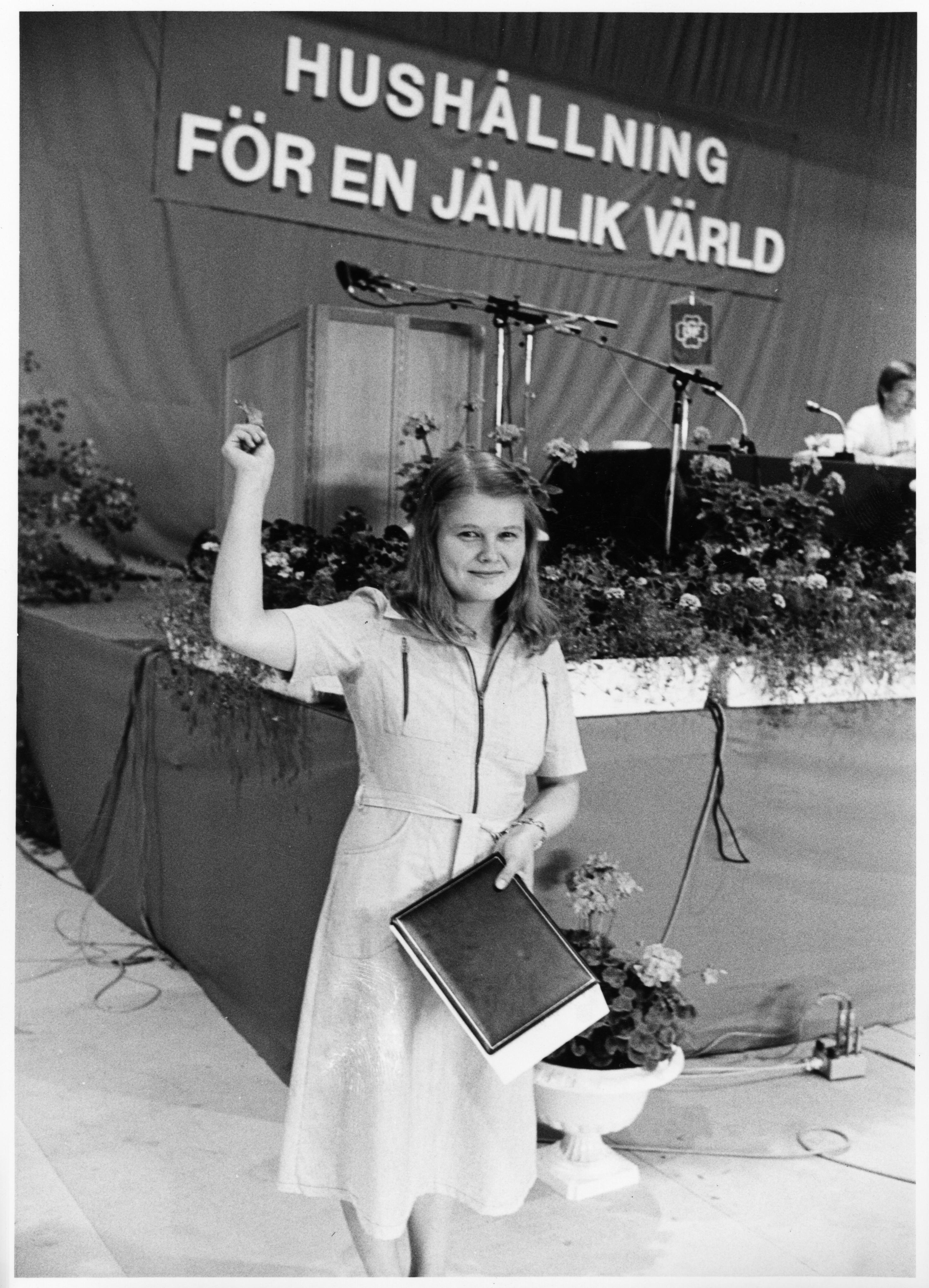 Maud Olsson, senare Olofsson, blivande partiledare för Centerpartiet, på stämman 1977.